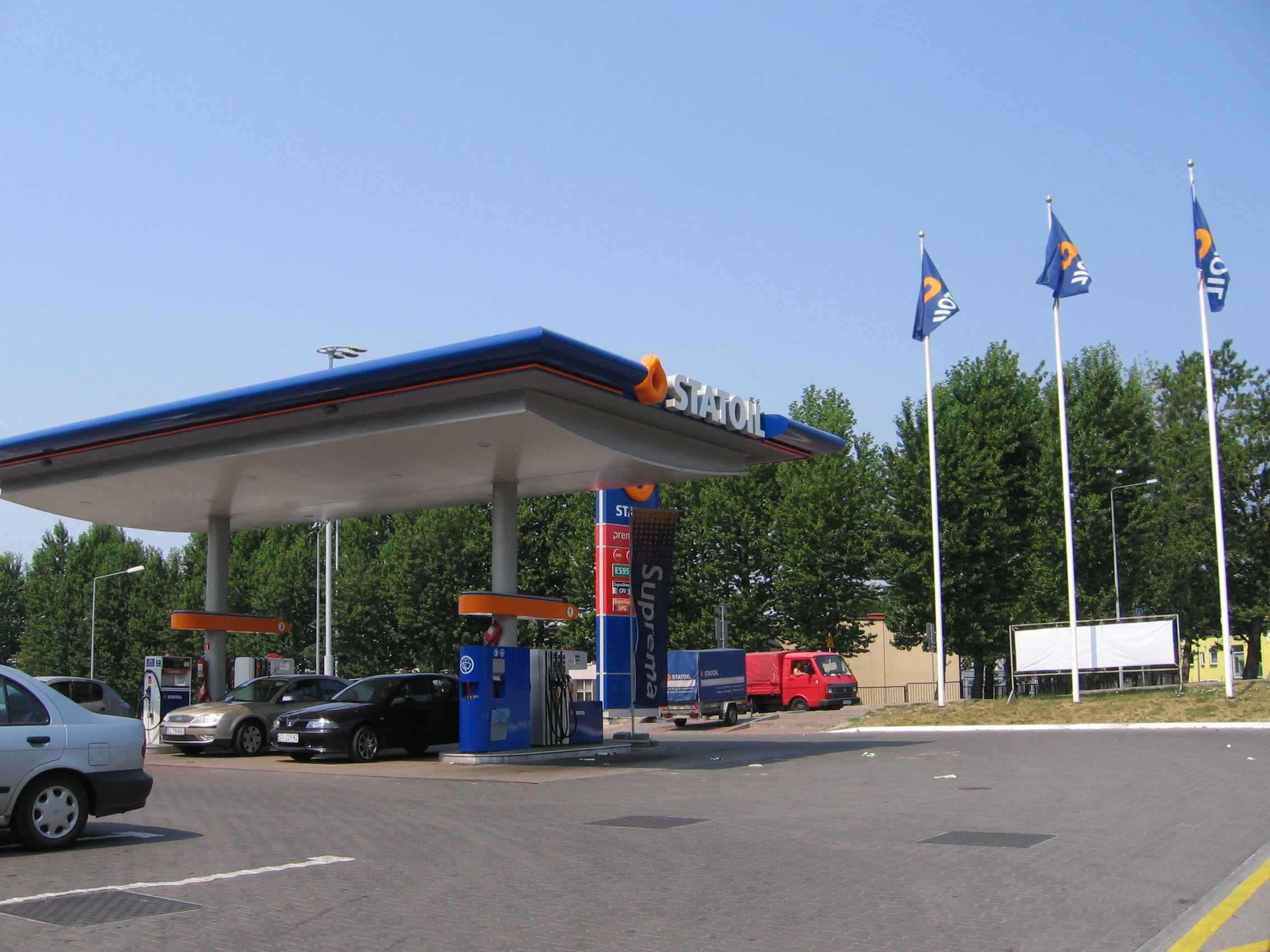 Statoil gazstation, Poland